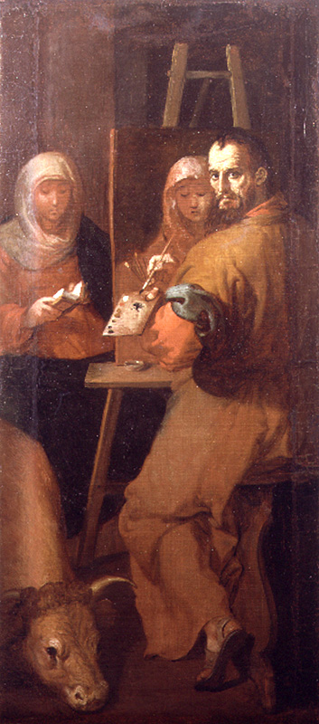 La obra representa a San Lucas Evangelista, y procede del retablo de la Cartuja de Porta Coeli.